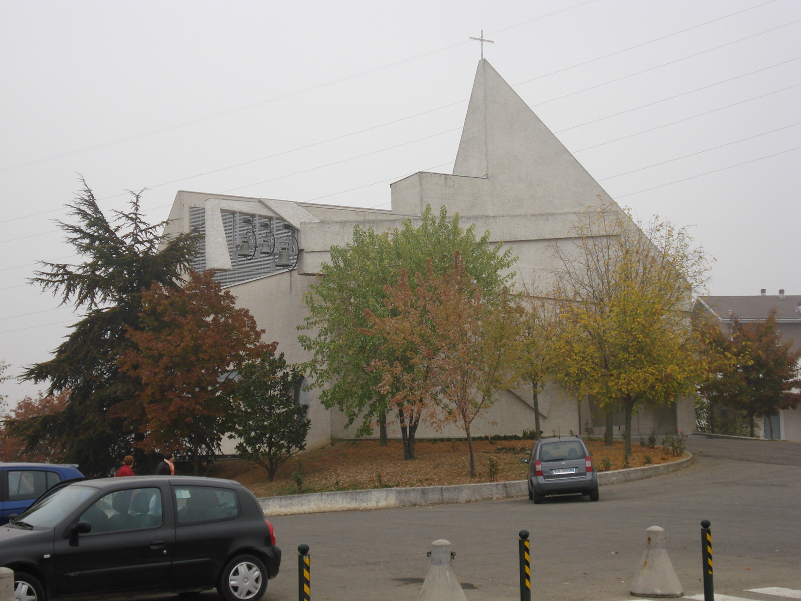 Heilige Kreuz Kircke